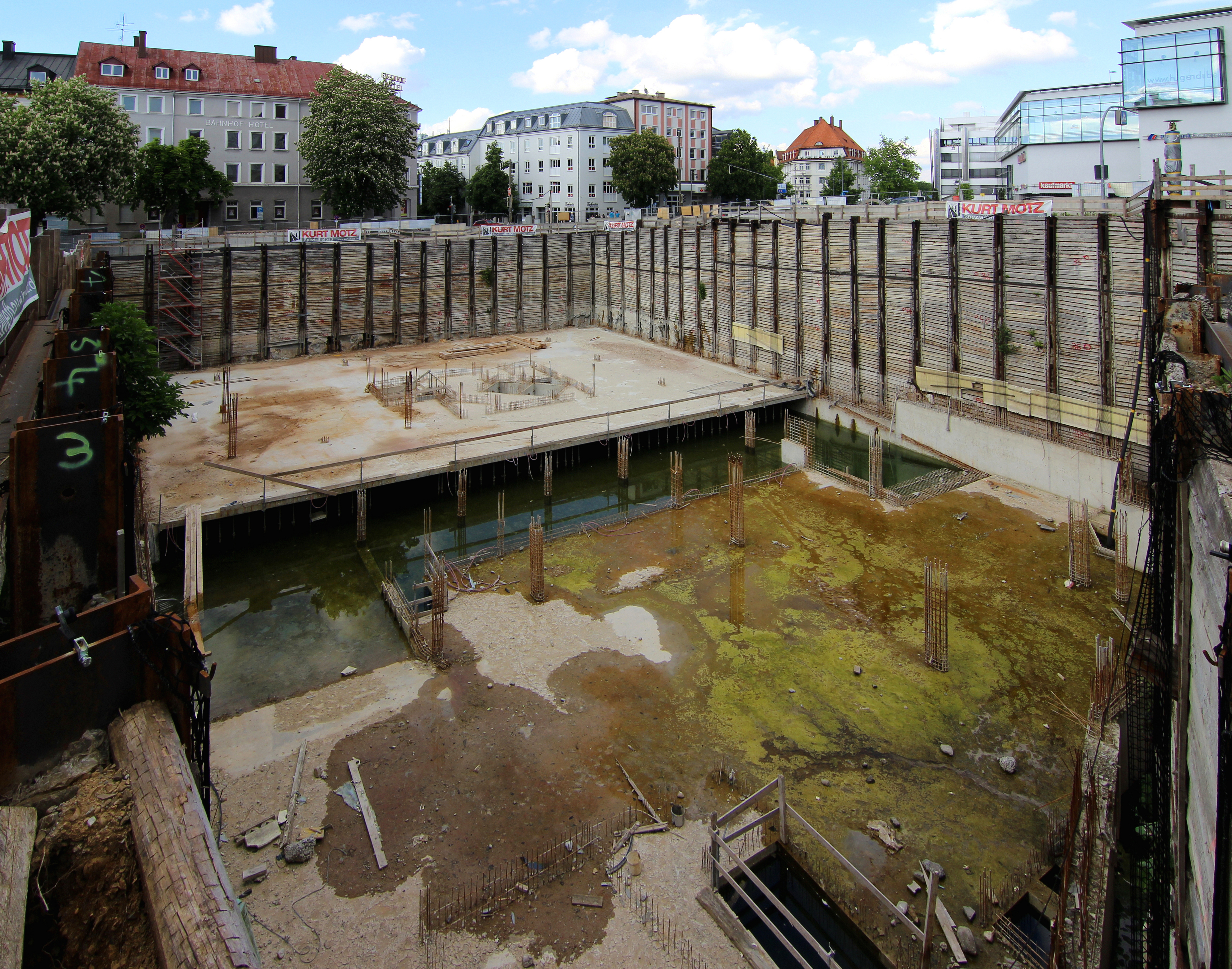 Baugrube für Geschäftshaus ("August-Fischer-Haus") in Kempten, auch Bauloch oder Loch genannnt.